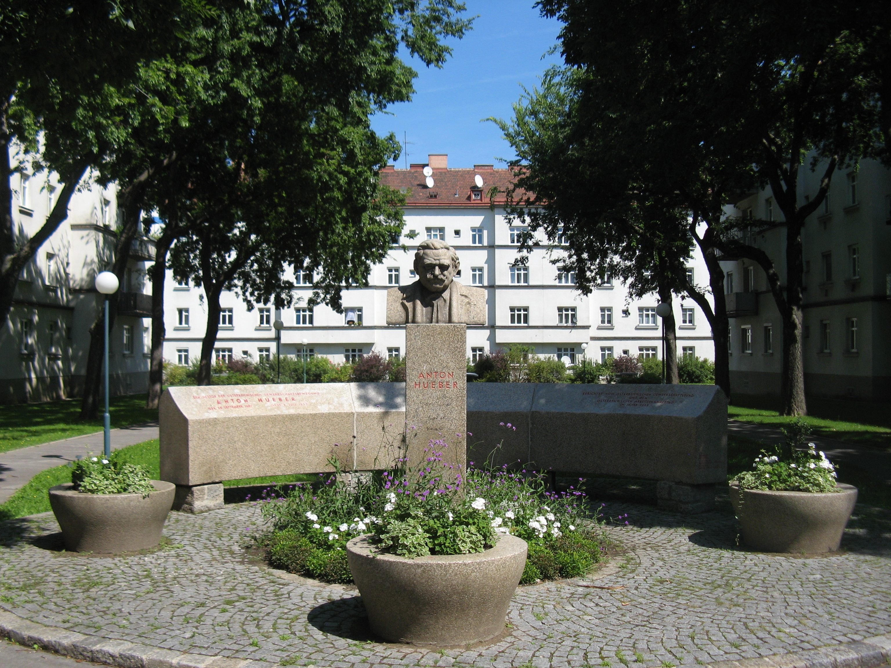 Denkmal für Anton Hueber (1953) von Mario Petrucci, Hueber-Hof, Quellenstraße 24B, Wien-Favoriten